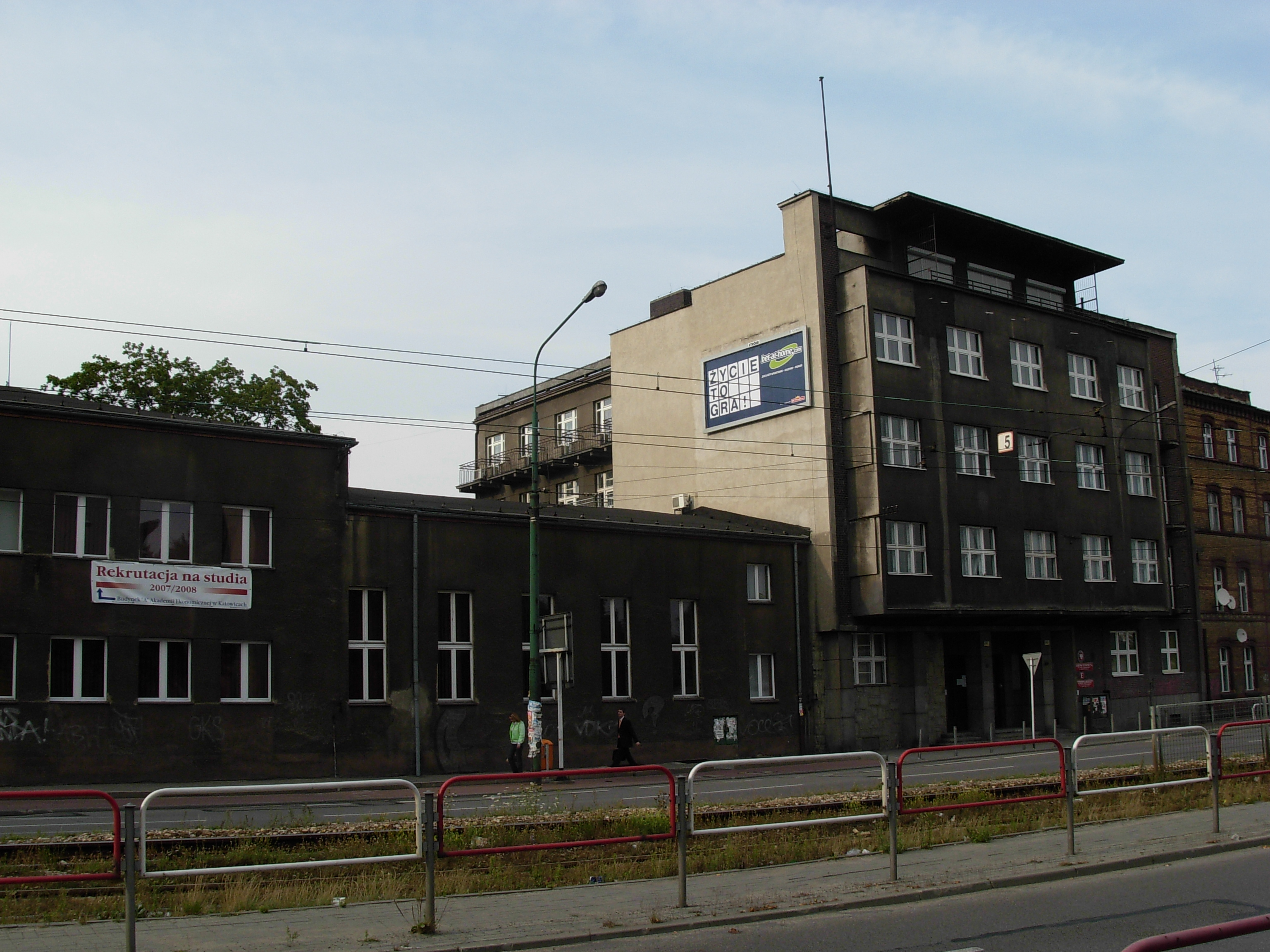 Katowice